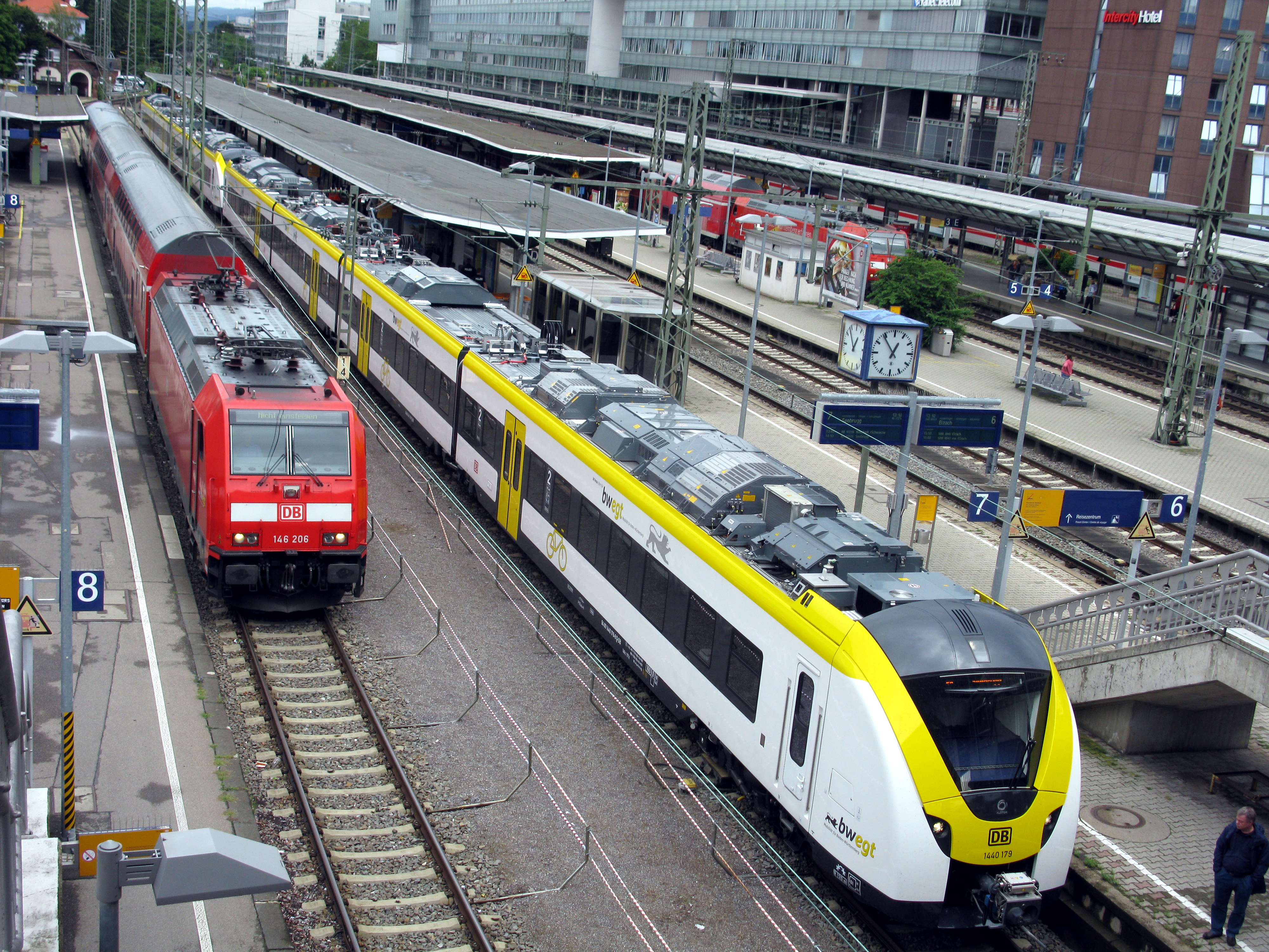 Alstom Coradia Continental in den baden-württembergischen Landesfarben auf der Höllentalbahn im Hauptbahnhof Freiburg im Probebetrieb, daneben ein alter Dopelstockzug in rot